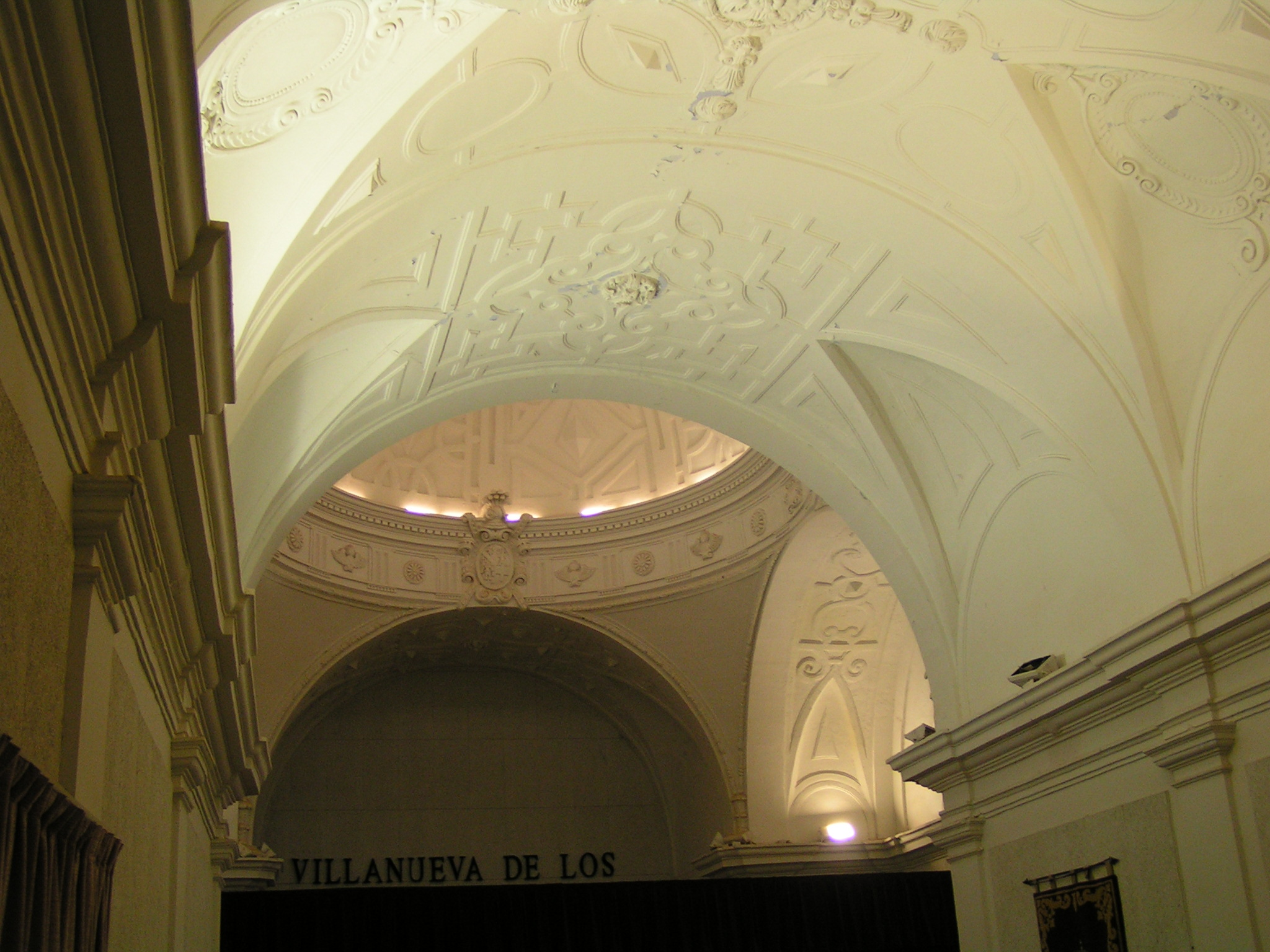 Convento de las Monjas Dominicas o 'de la Encarnación', situado en la Calle Mayor de Villanueva de los Infantes